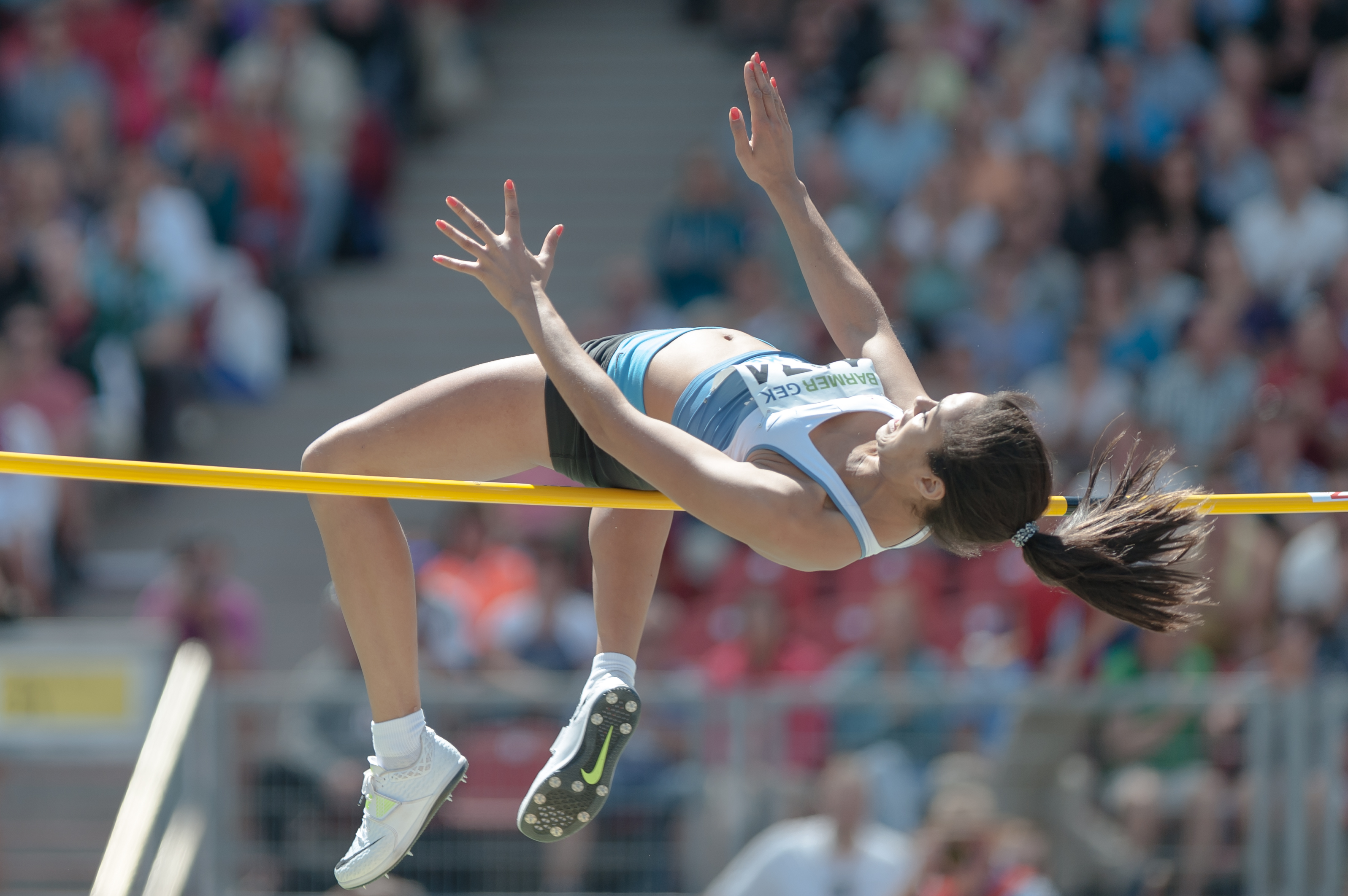 Deutsche Leichtathletik-Meisterschaften 2015: Frauen Hochsprung - Marie-Laurence Jungfleisch, LAV Stadtwerke Tübingen